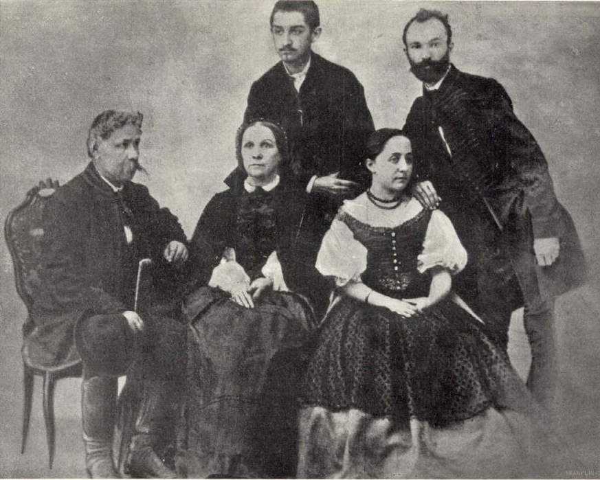 Arany János és családja, a Vasárnapi Újság illusztrációja, 1914